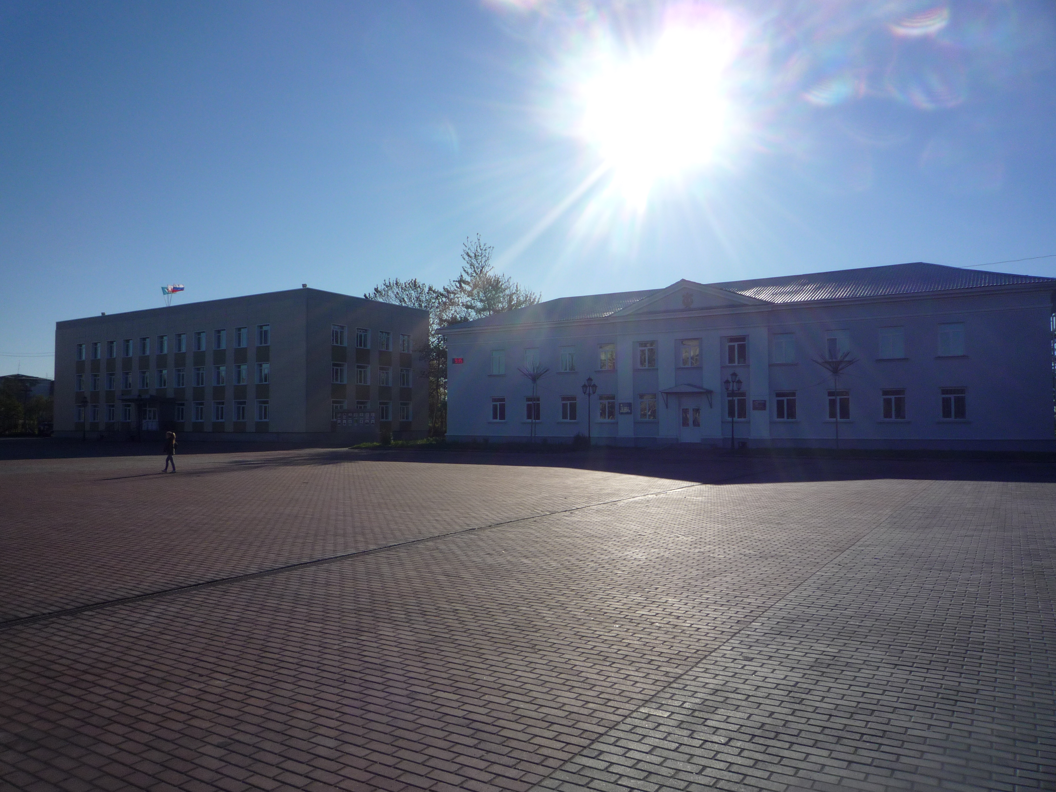 サハリン州ポロナイスク市役所